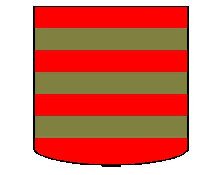 Grb porodice Grisogono